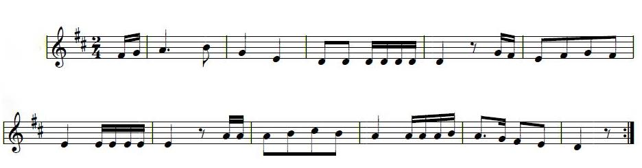 Una dona llarga i prima (cançó tradicional)